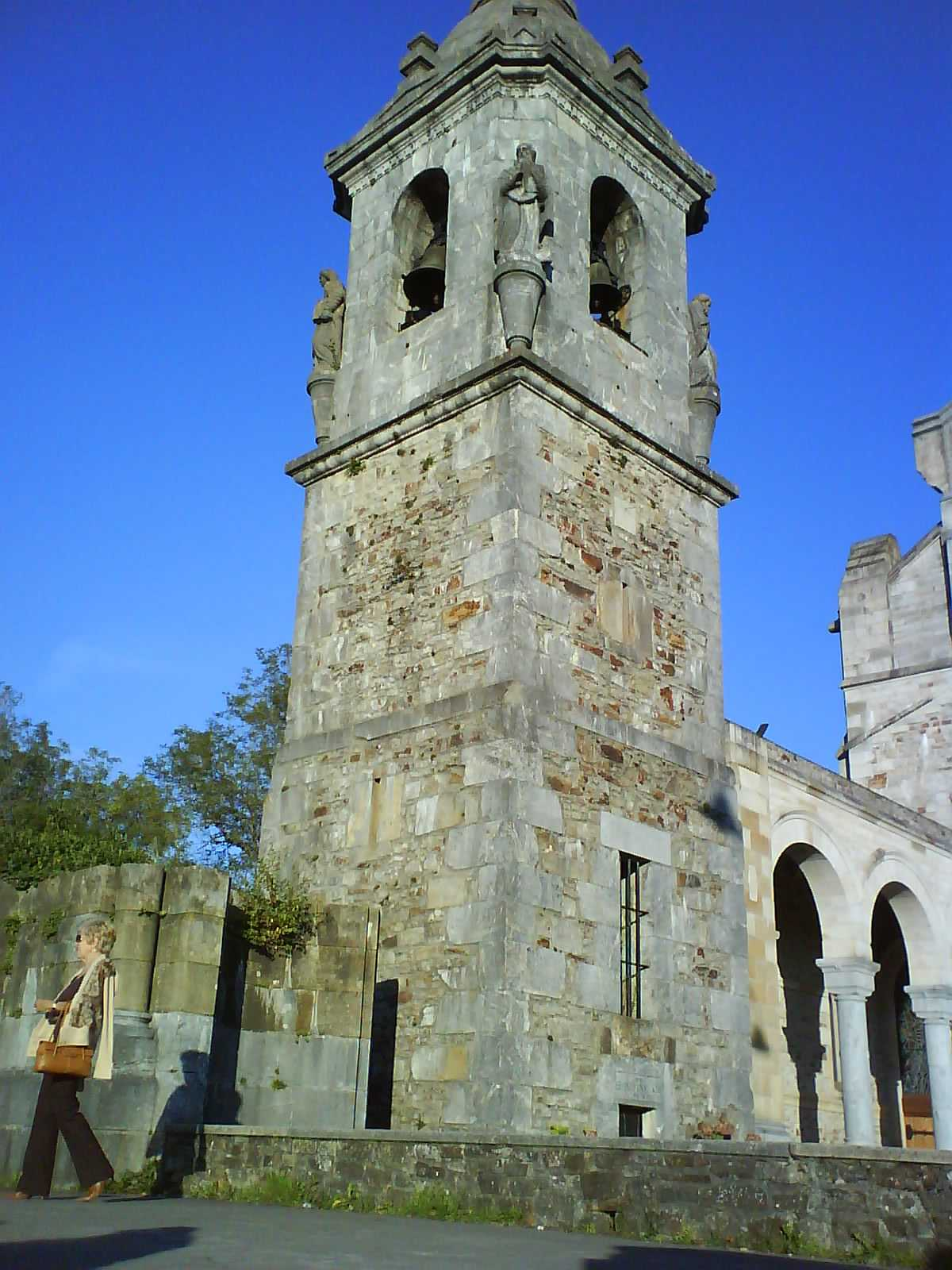 Santuario de los santos Antonios de Urkiola, Torre campanario Abadiano , Vizcaya, País Vaco, España.